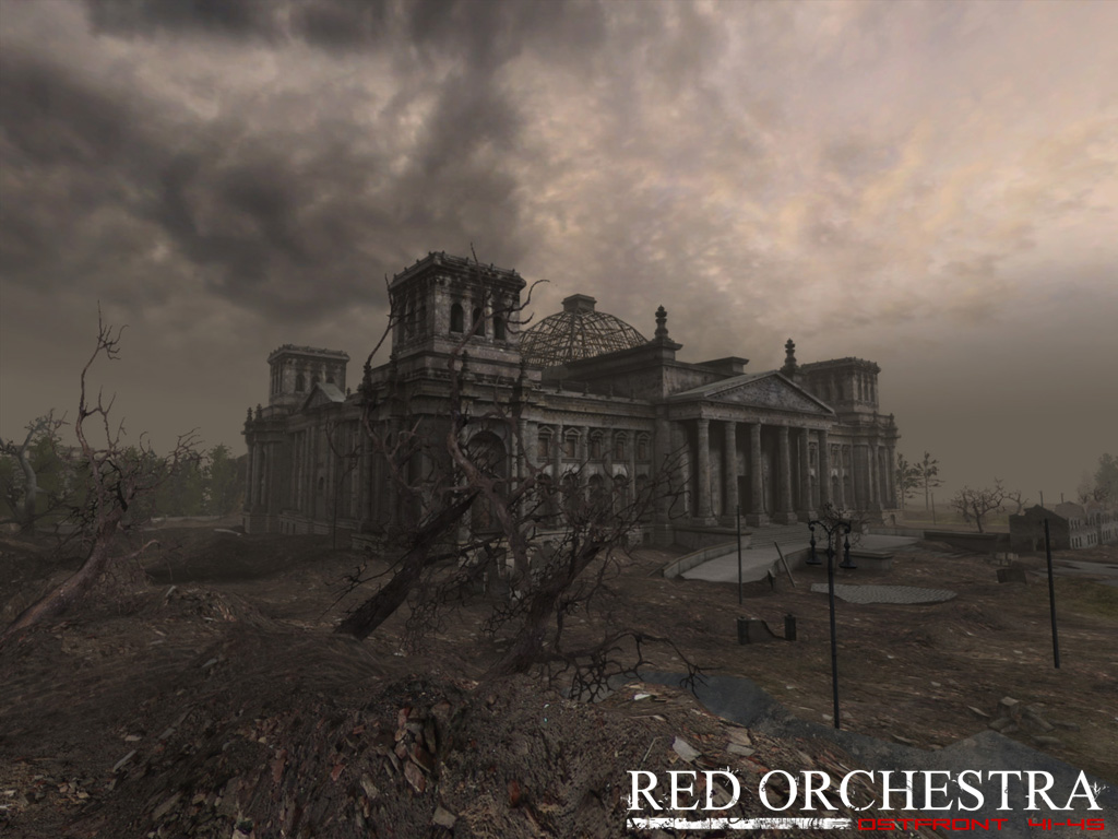 Red Orchestra German Reichstag